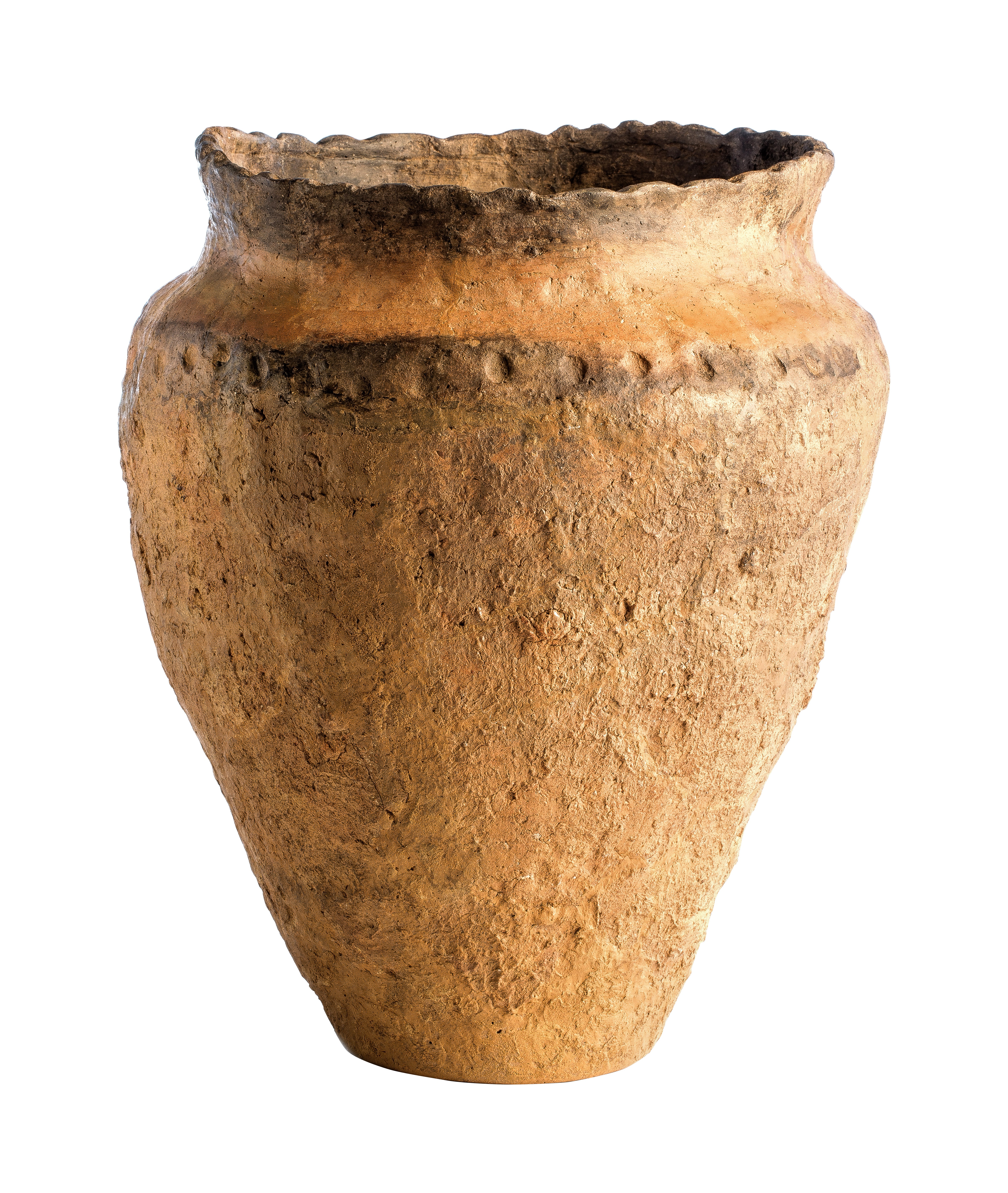 Harpstedturne in handgevormd aardewerk, 800 tot 600 VC, vindplaats: Neerpelt, De Roosen, 1959, grafheuvel IX, collectie Gallo-Romeins Museum Tongeren, GRM 12356